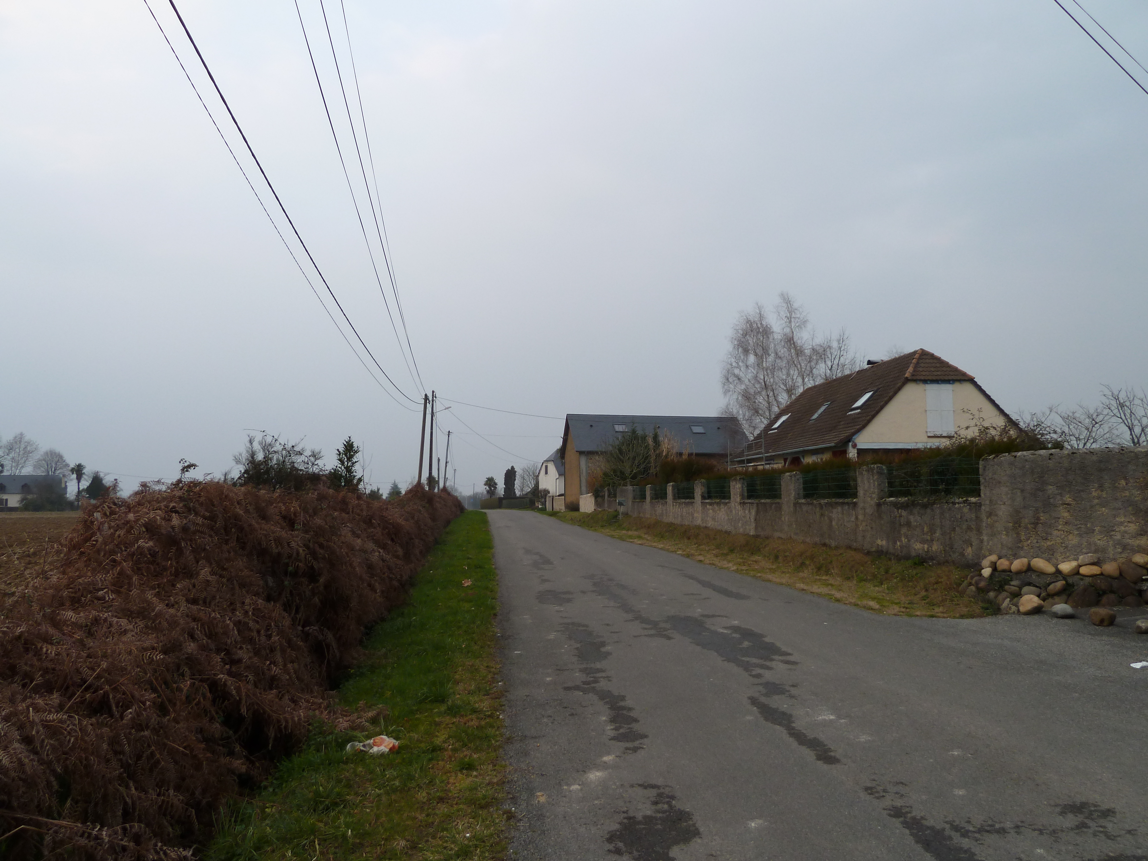 Quartier La hagède, Saint-Jammes, France